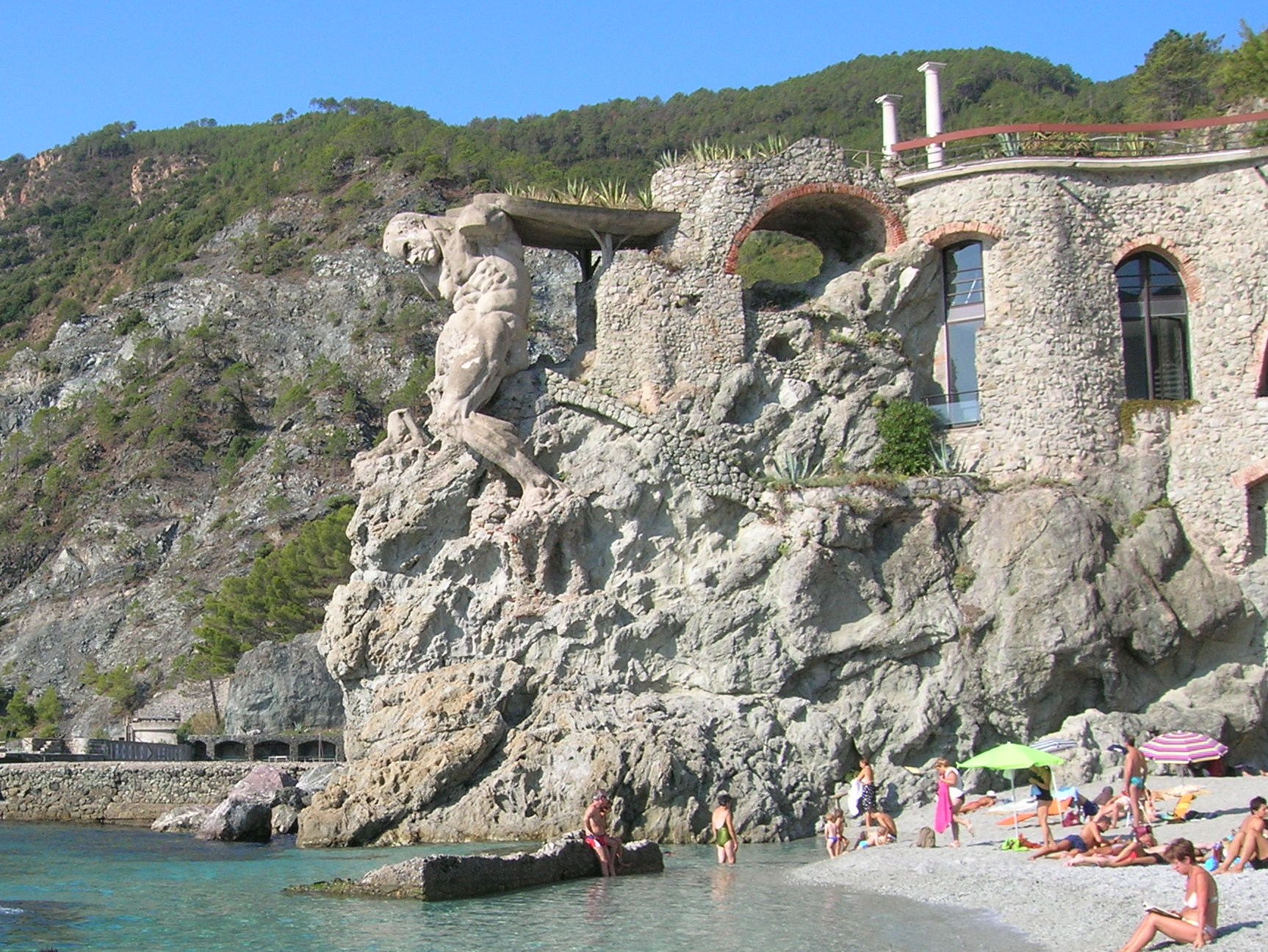 Monterosso al Mare- Il Gigante